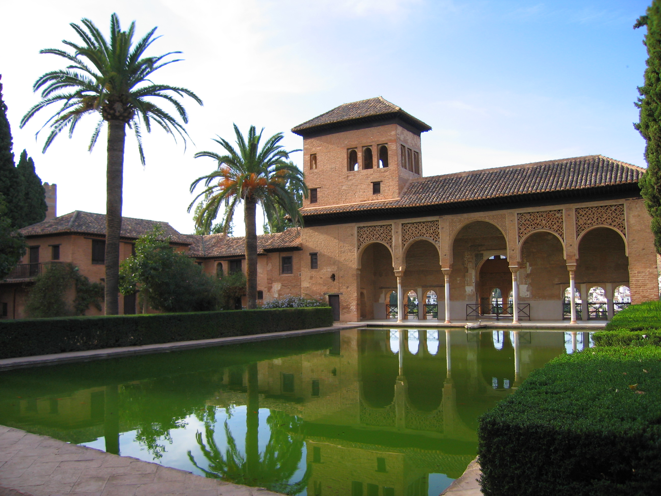 Palacio del Pórtico